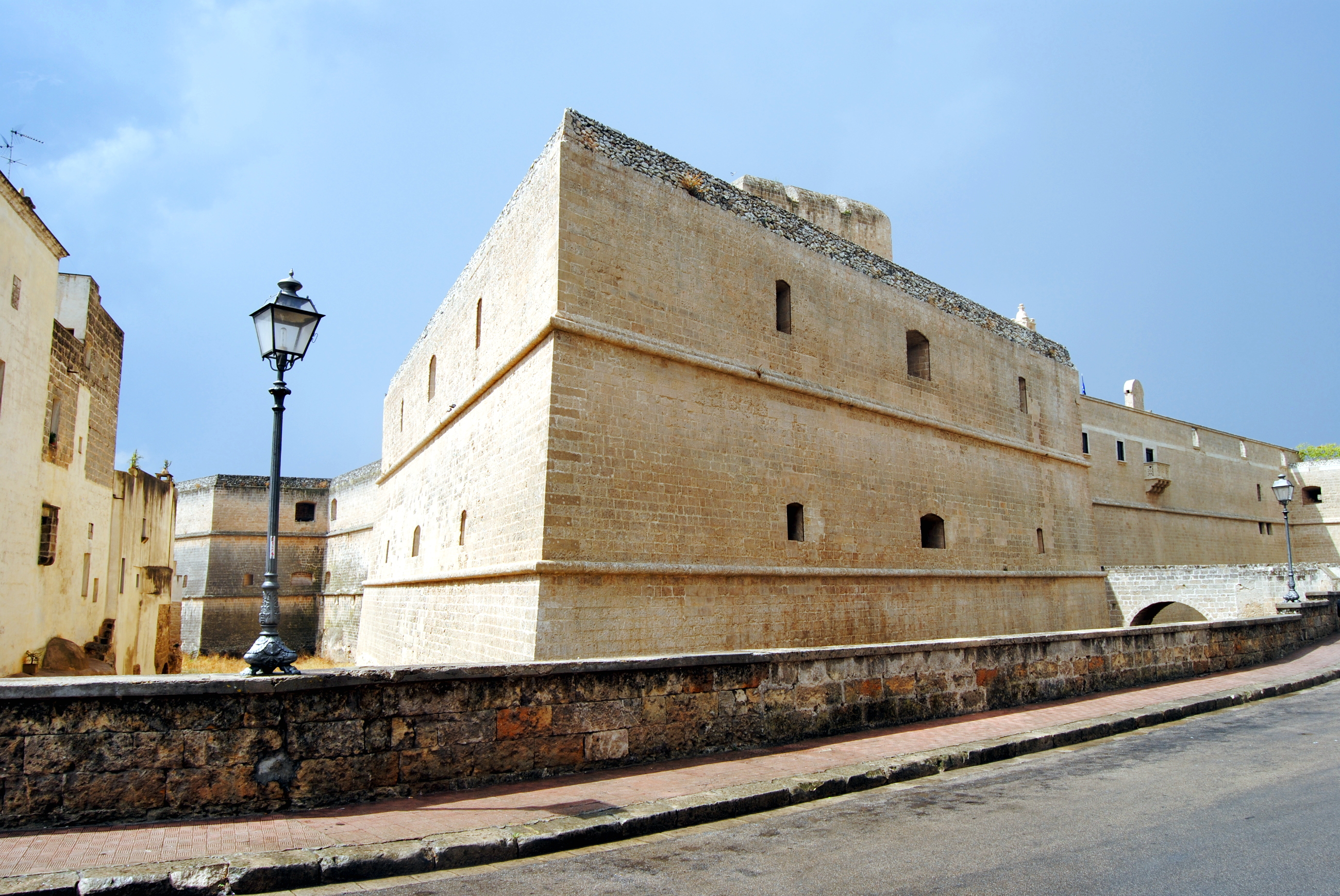 Il Castello di Copertino ingloba una fortezza sorta in epoca normanna e ampliata successivamente dagli Angioini. Ha una pianta quadrangolare ai cui vertici si innestano quattro possenti baluardi a lancia. Lungo il perimetro si misurano novanta feritoie distribuite su tre ordini separati da una cornice marcapiano. Dall'esterno è possibile distinguere il maschio a base scarpata realizzato nel XIII secolo This is a photo of a monument which is part of cultural heritage of Italy.